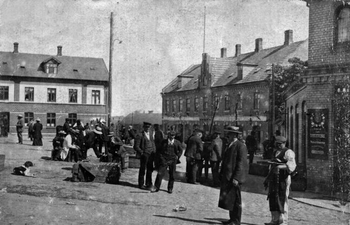 Torvedag 1906: Hadsund blev til som en handelsplads og fik naturligvis også sin centrale torveplads.